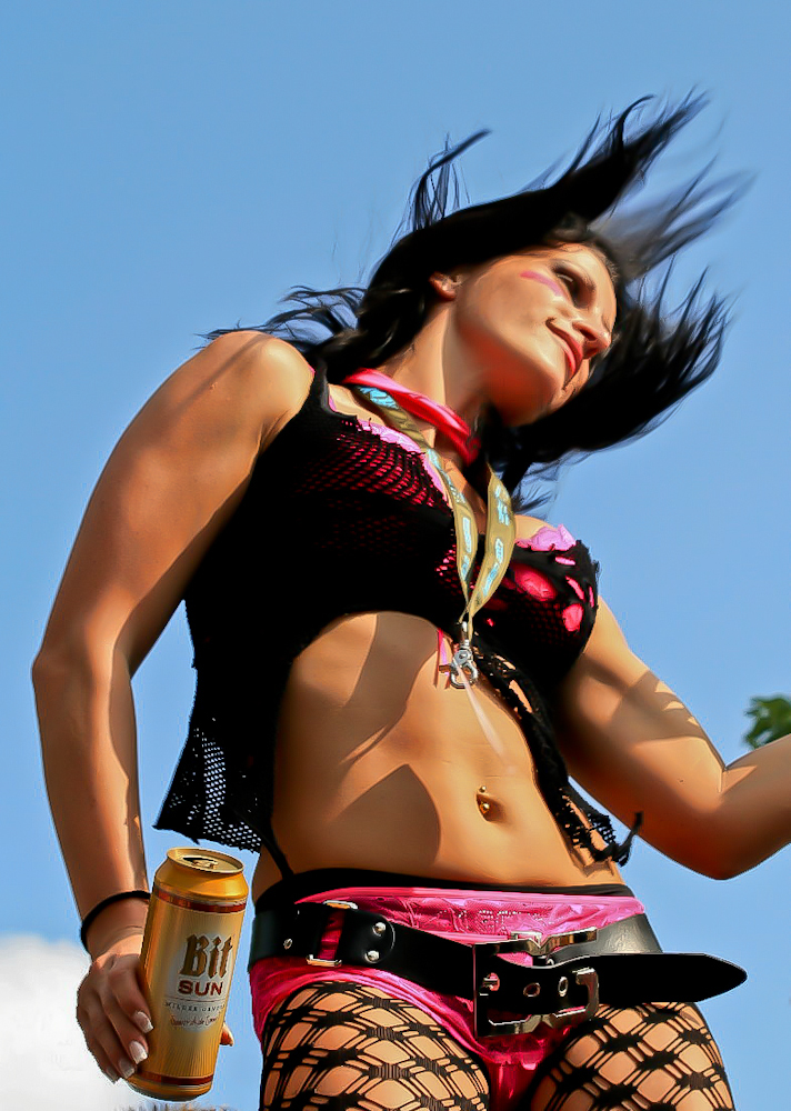 Loveparade 2007 in Essen